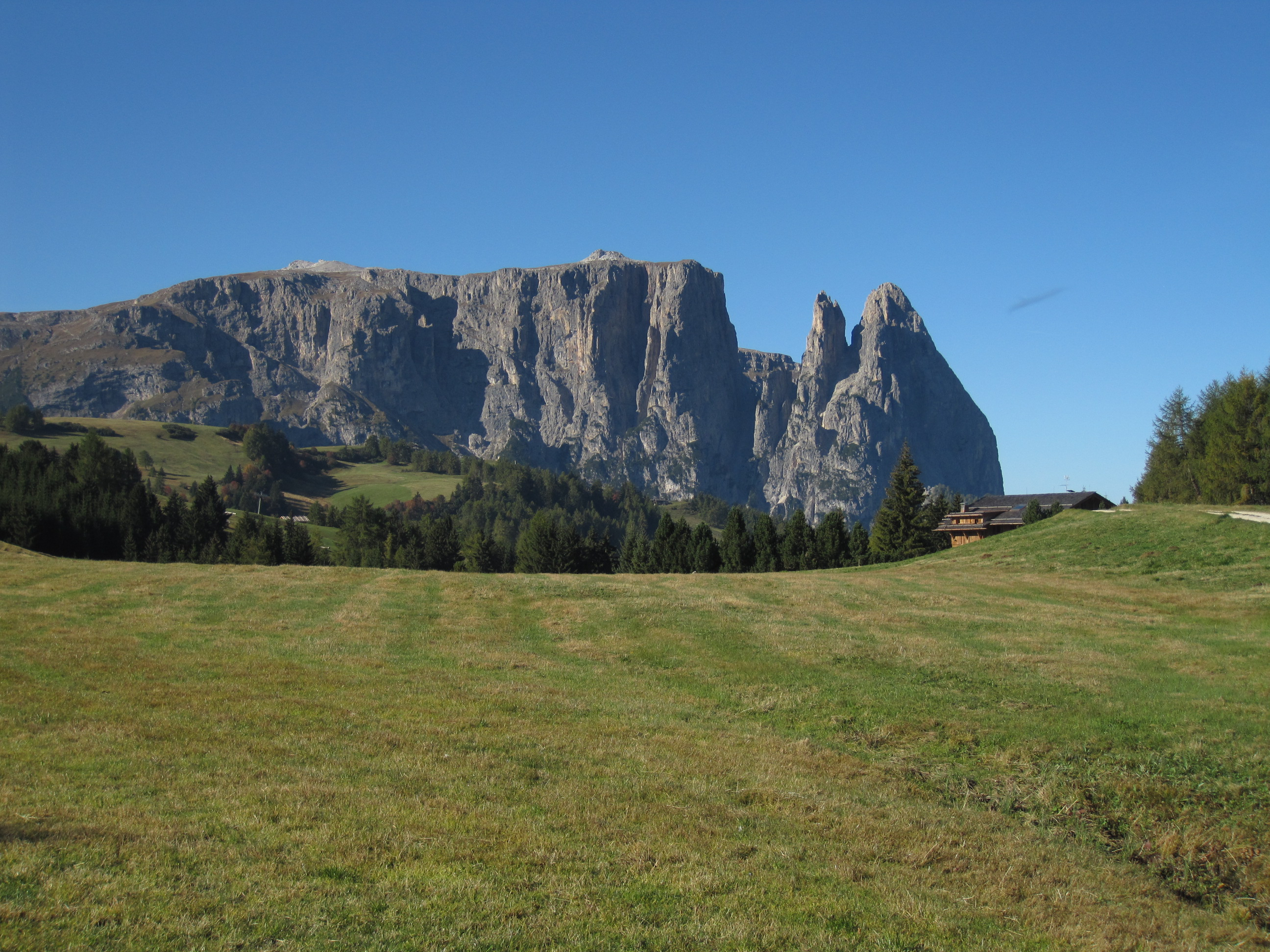 Schlern mit Santnerspitze von der Seiser Alm aus